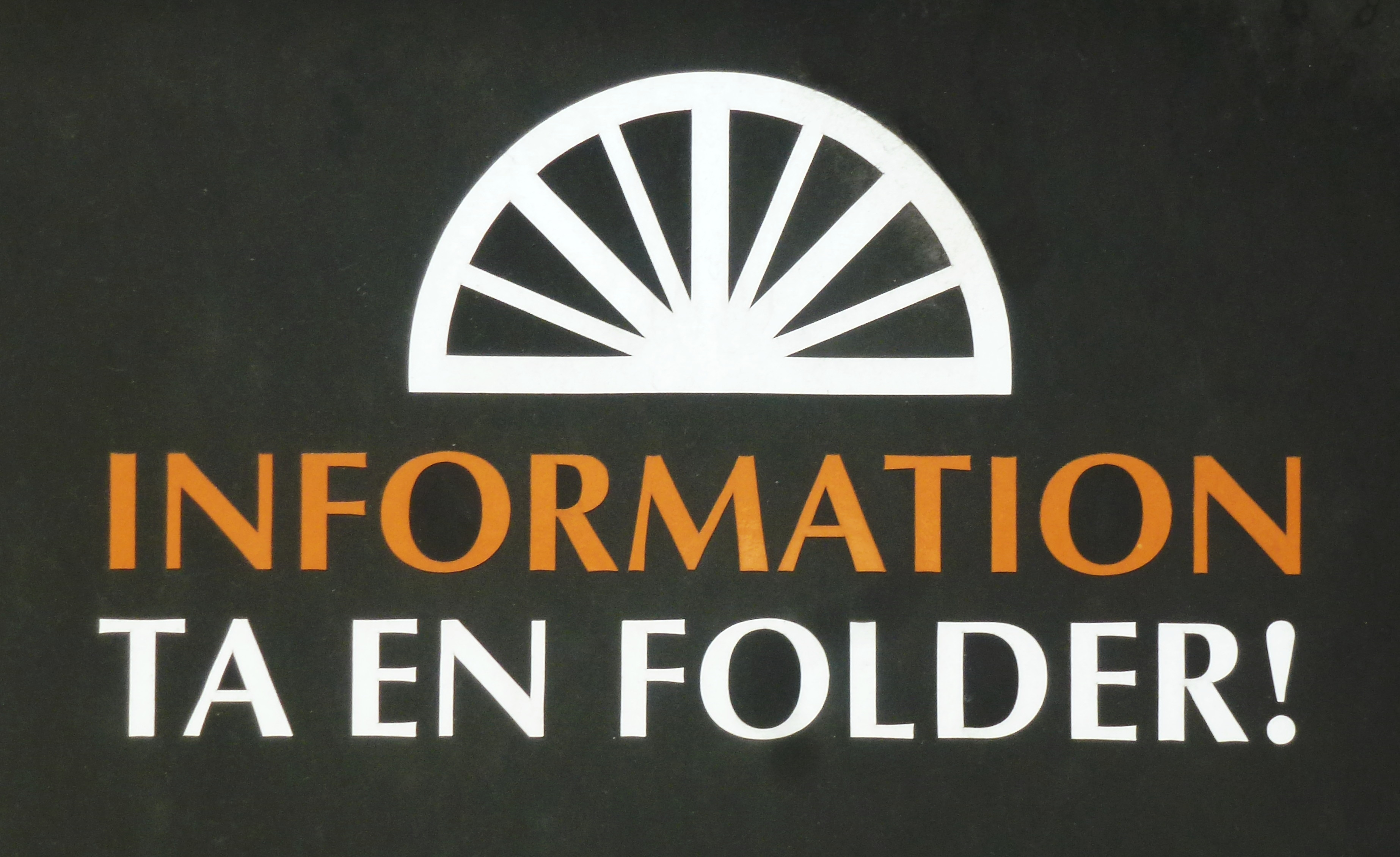 Ekomuseum Bergslagen skylt